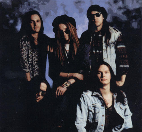 Tornado Babies (svensk rockgrupp) 1992